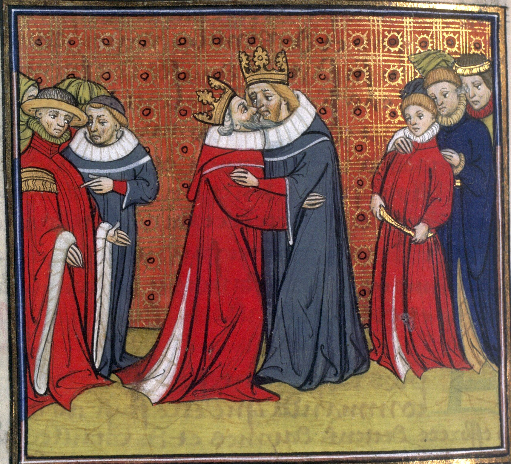 Hommage d'Édouard I à Philippe le Bel, enluminure des XIV-XV siècles ; Cote : Français 73, folio 313 v° Origine : BNF, Richelieu, Manuscrits français, Grandes Chroniques de France, Paris, XIV-XV siècles. Pour les droits, voir le haut de la page (libre de droit)[1]